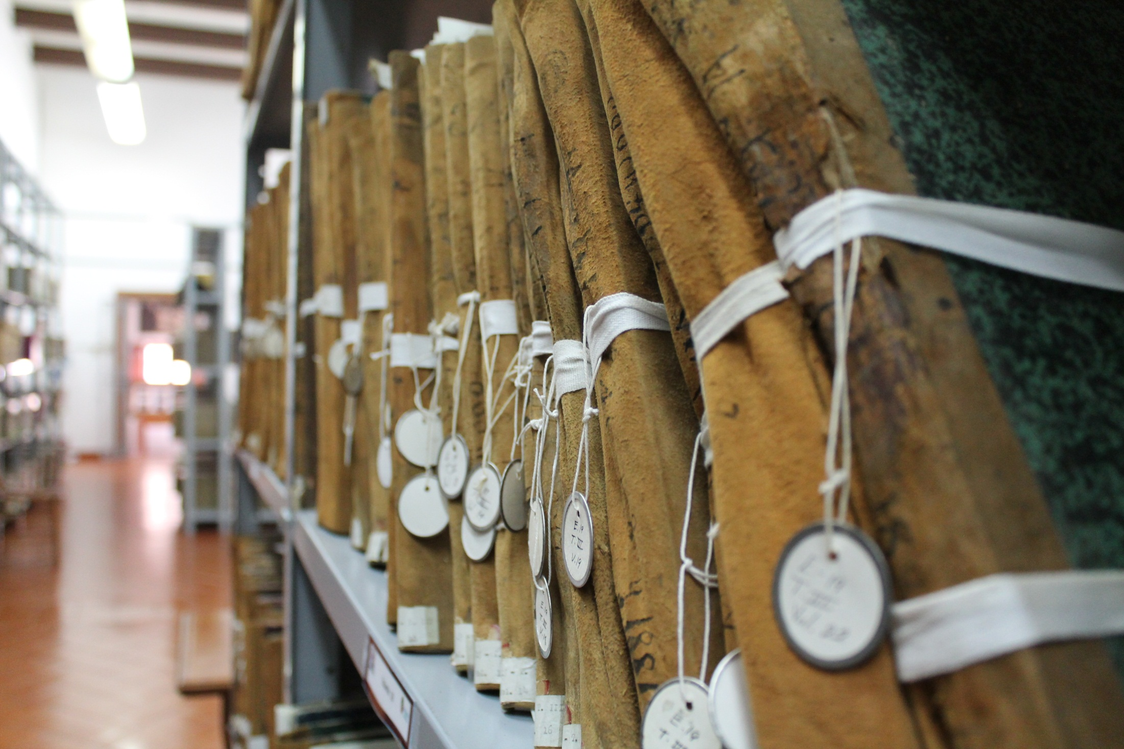 Archivo Histórico del Colegio de las Vizcaínas. Fondo reservado.